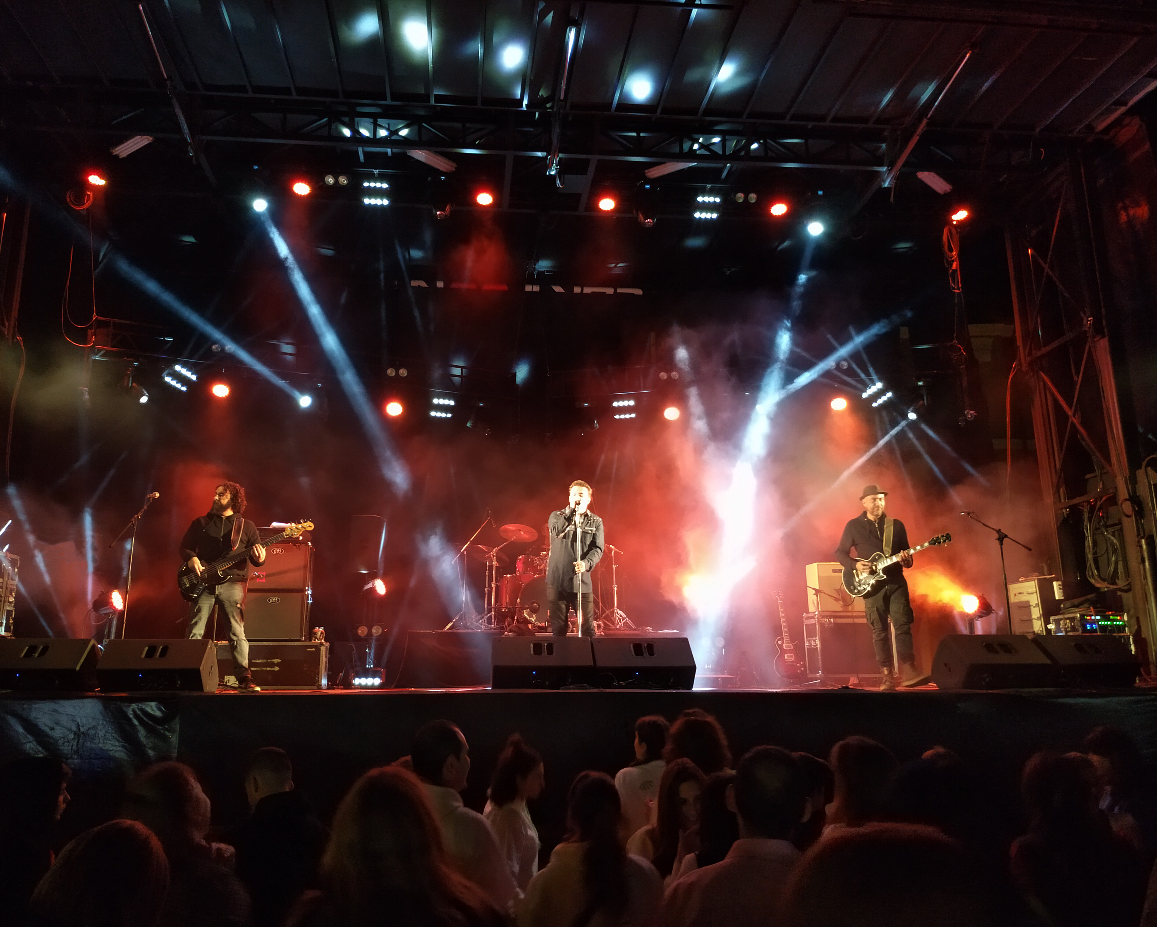 Actuación en directo del grupo Seguridad Social